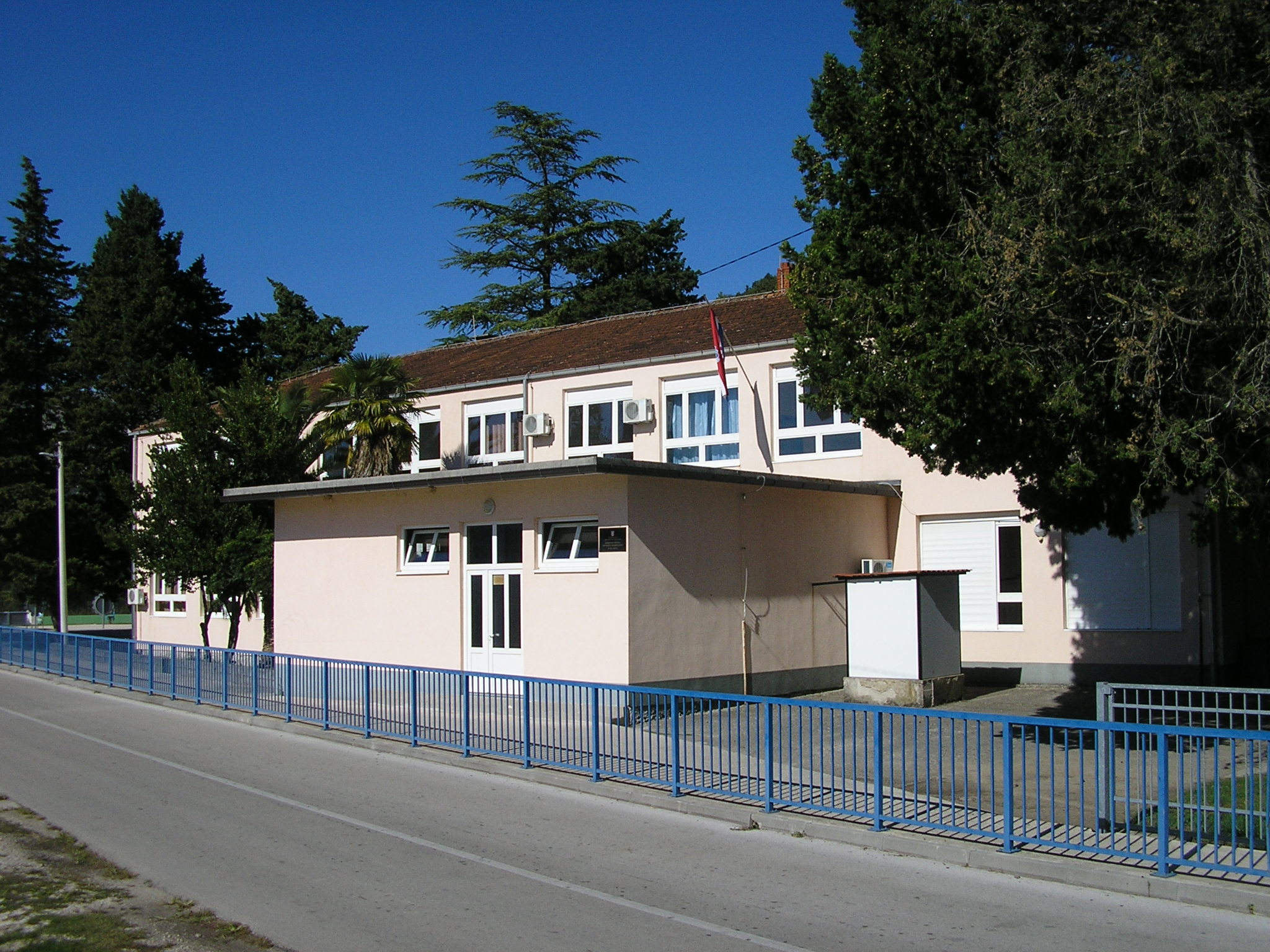 Osnovna škola Otrići-Dubrave